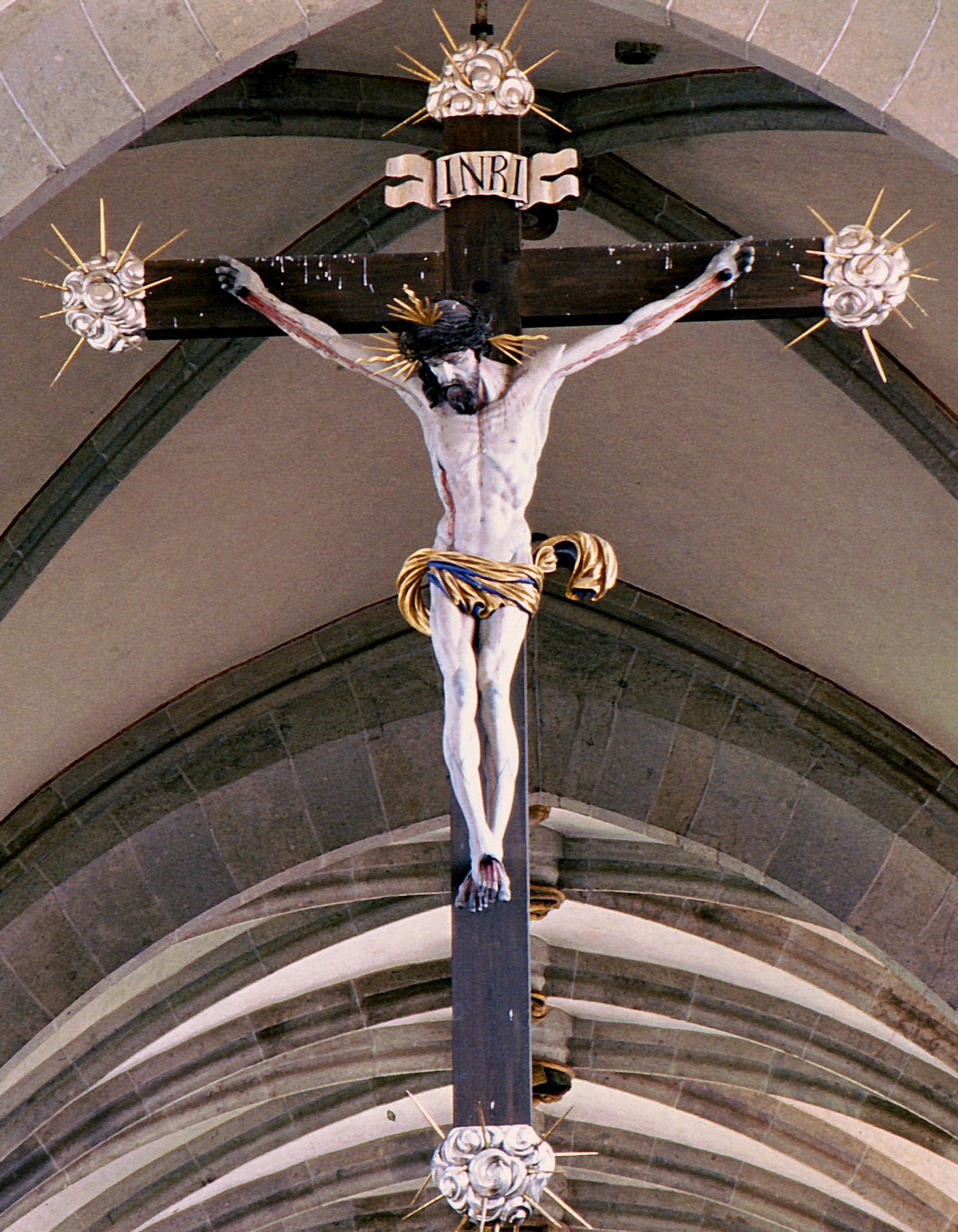 Chorbogenkruzifix in der Klosterkirche von Kaisheim von Andreas Thamasch, 1673